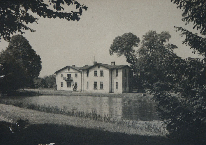 House in Dobiecinie of Polish landlord, Felicjan Otocki a member of the Second Russian State Duma, 1907